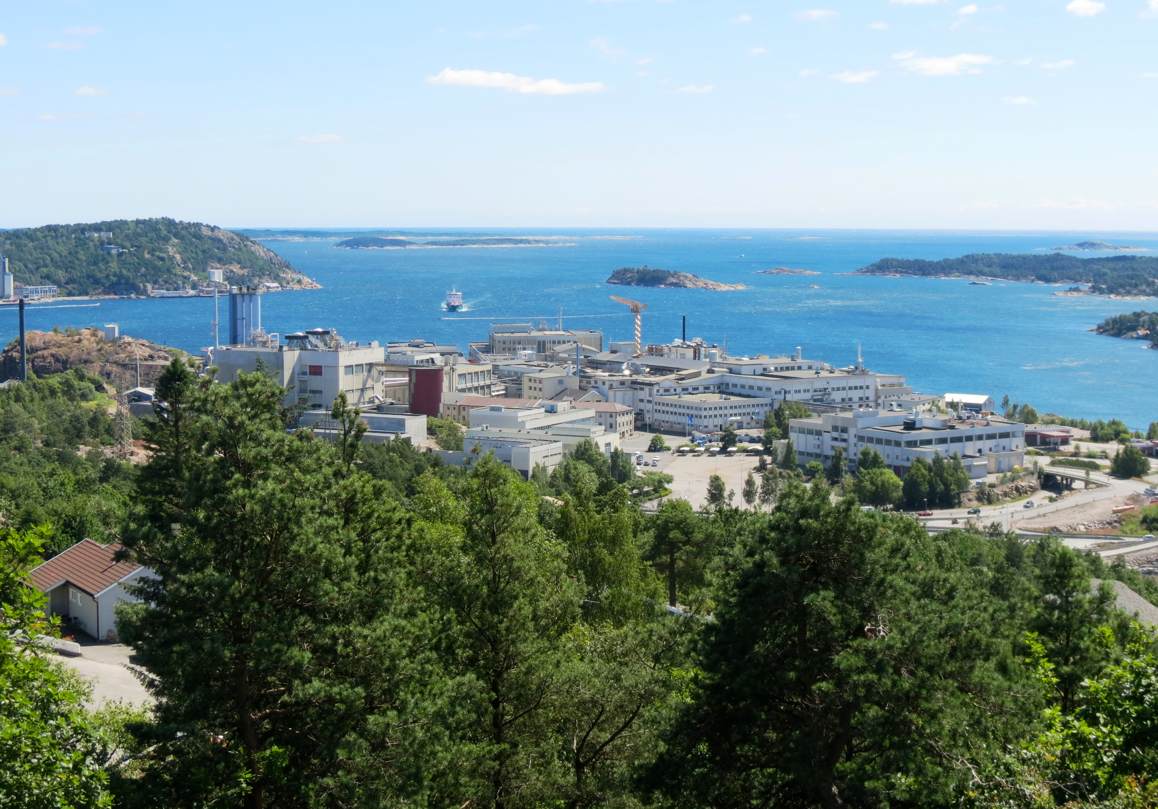 Xstrate Nickel Nikkelverk i Kolsdalen, Kristiansand, Norge